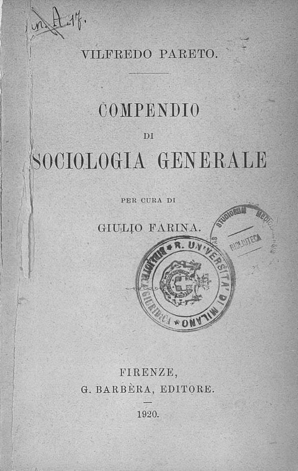 Frontespizio